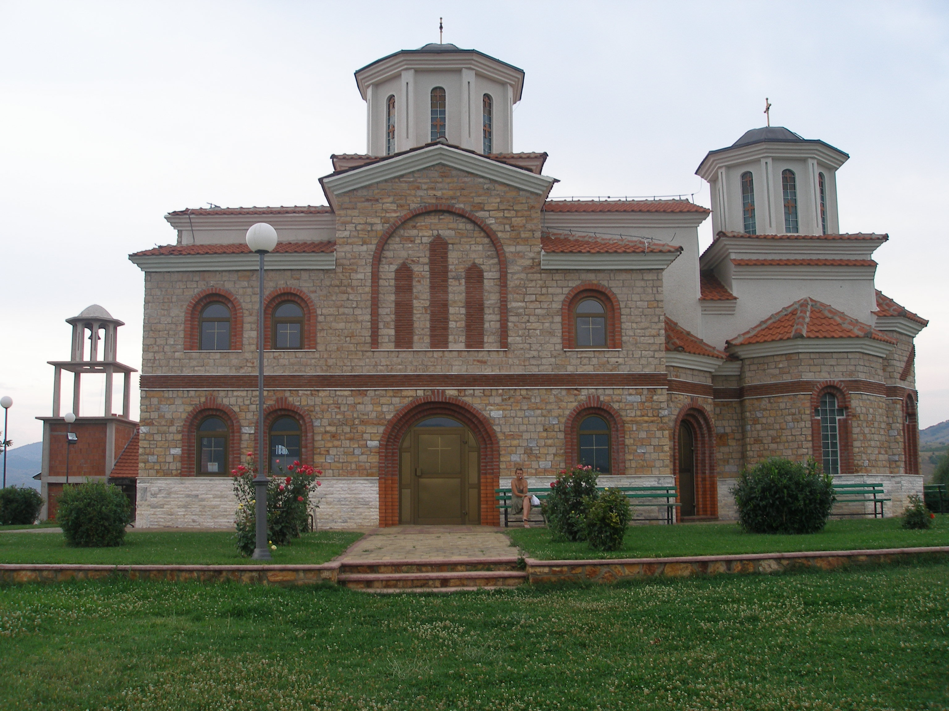 Црквата „Св. Јоаким Осоговски“ во село Јакимово, виничко